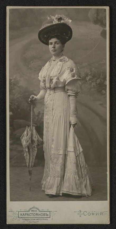 Евтимия Станишева